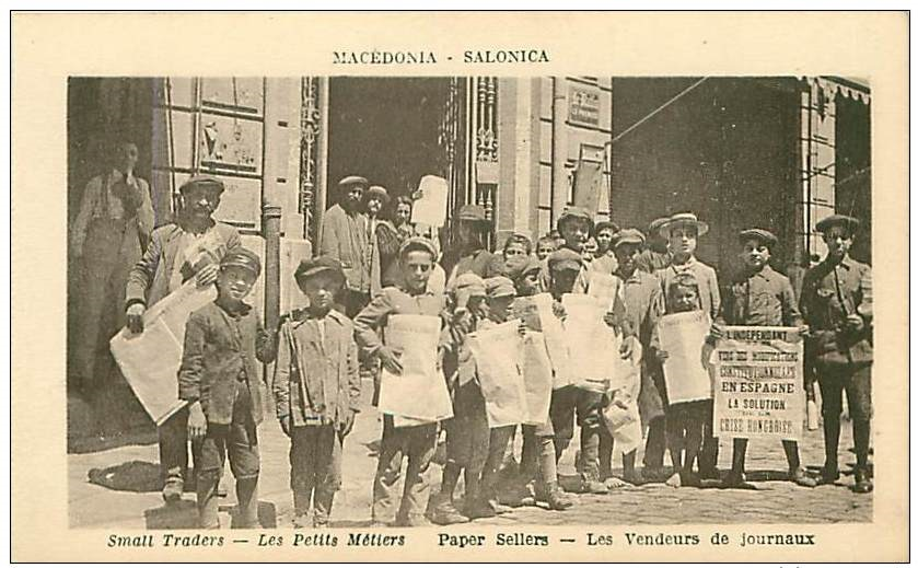 Macedonia Salonica Les Petits Metiers Les Vendeurs de Journeaux